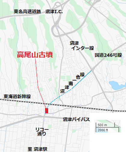 高尾山古墳の立地を示した地図。OSMをもとに作成。 This map may be incomplete, and may contain errors. Don't rely solely on it for navigation.